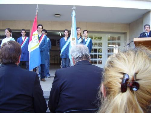 Aniversario n°75 de la Escuela Pizarro